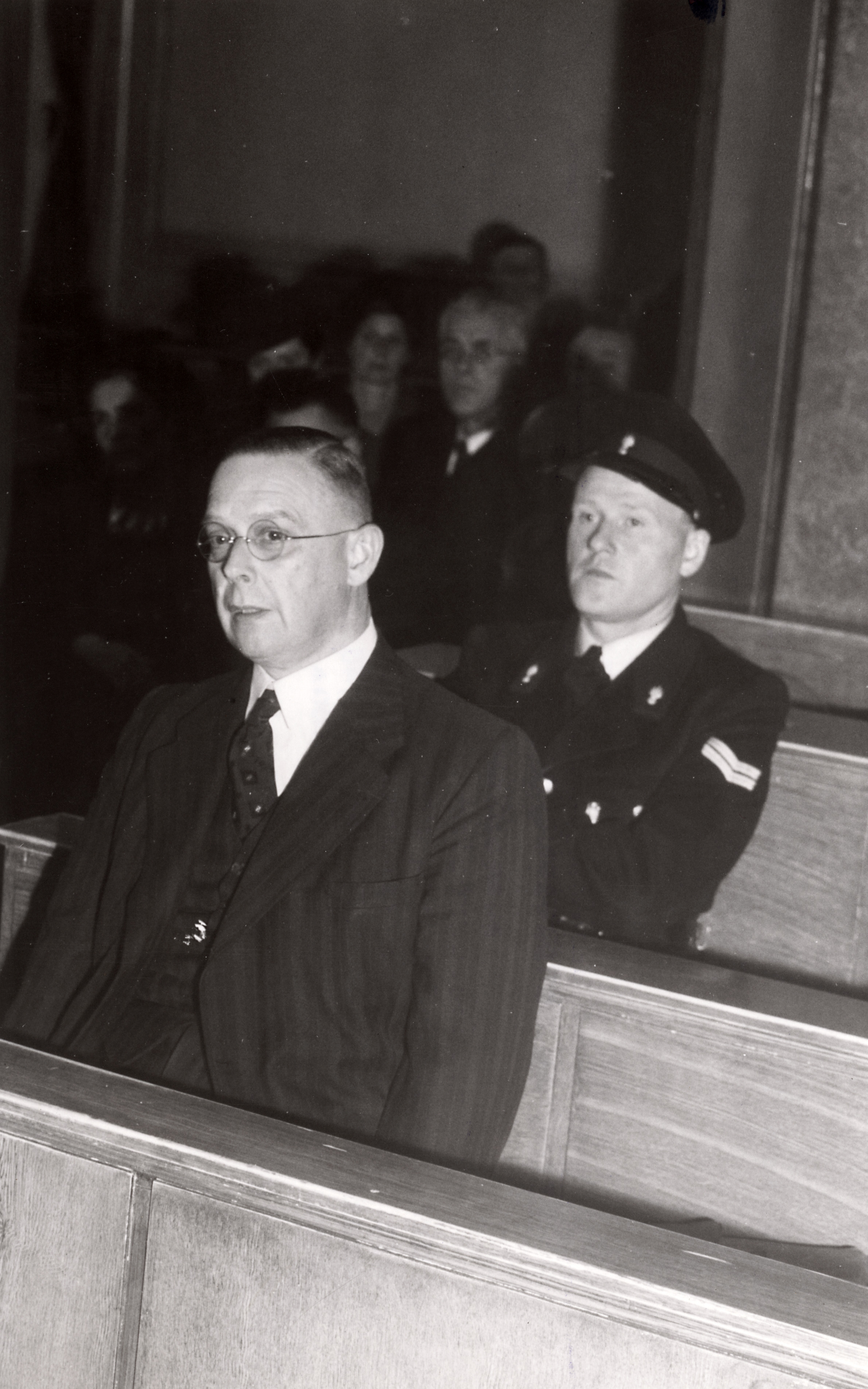 Na de Tweede Wereldoorlog. Personen op naam. Professor Dr. J.van Dam in de beklaagdenbank wegens hulpverlening aan de Duitsers d.m.v. zijn functie van Secretaris-Generaal van het Departement van Onderwijs, Wetenschap en Cultuurbescherming. Nederland, Amsterdam, 29-10-1946